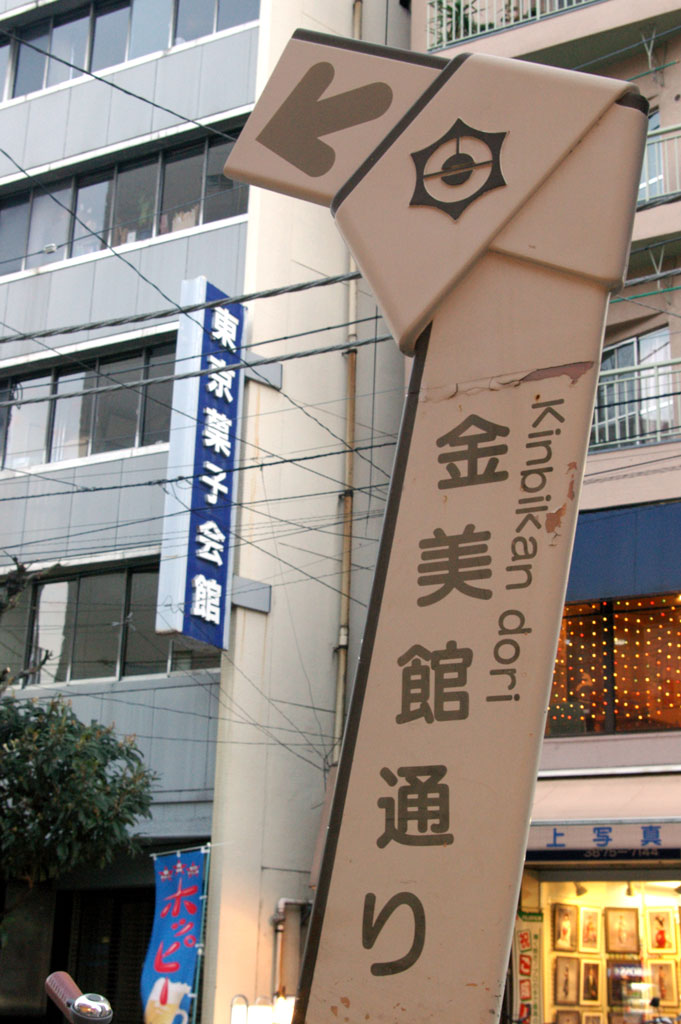 入谷金美館がかつて存在した金美館通り周辺